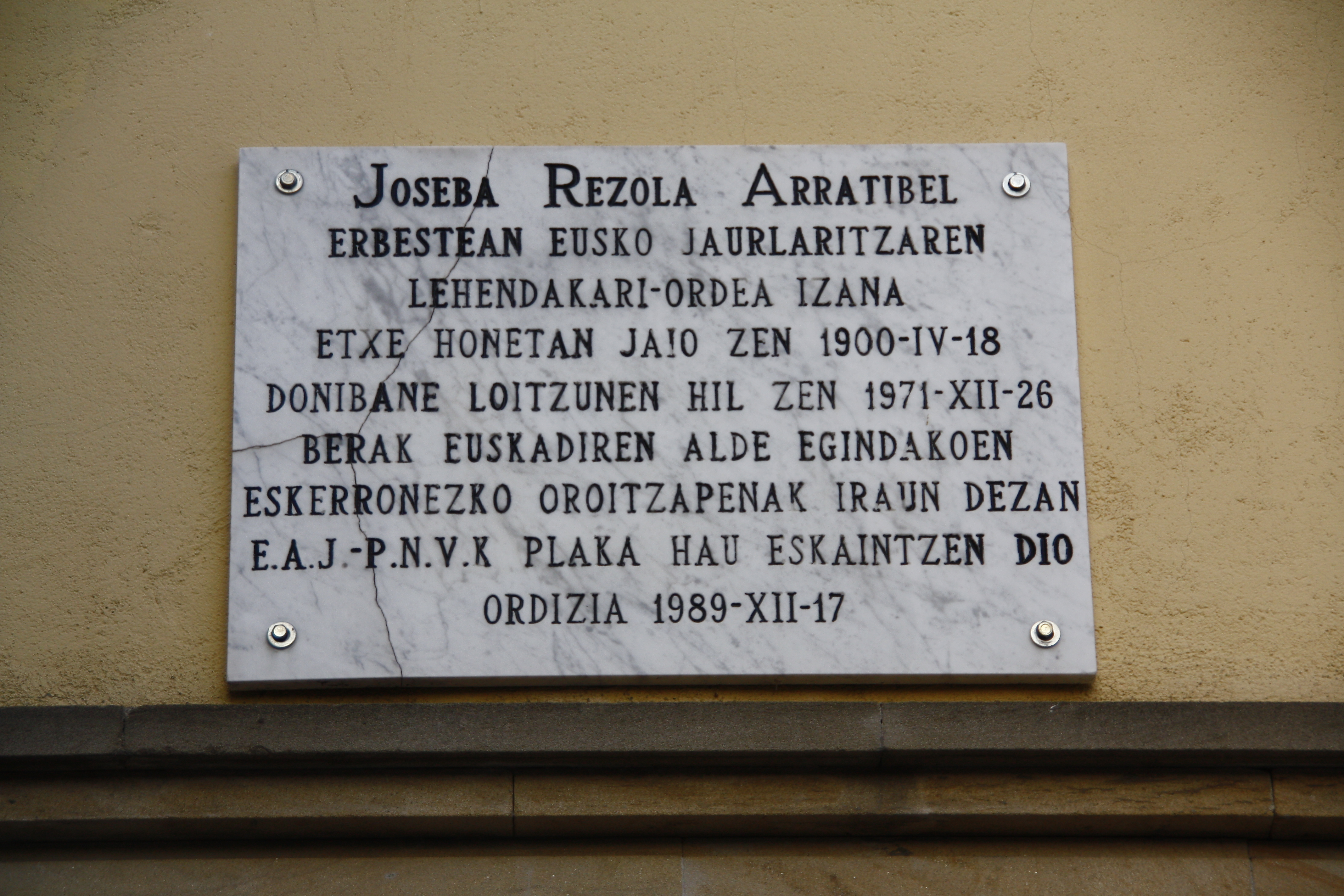 Joseba Rezolaren oroigarria Ordiziako bere jaiotetxean.